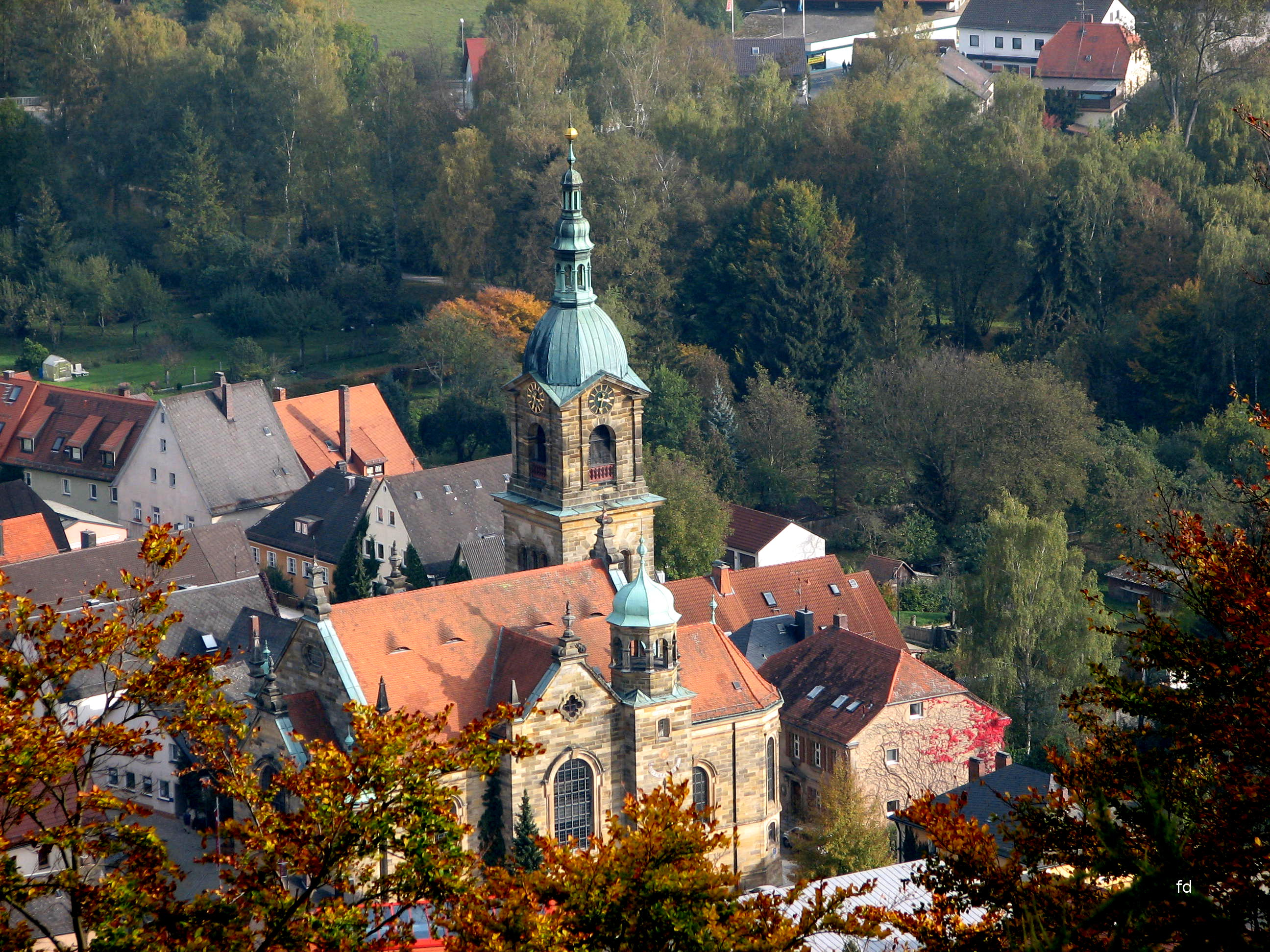 Pfarrkirche St. Bartholomäus in Pegnitz